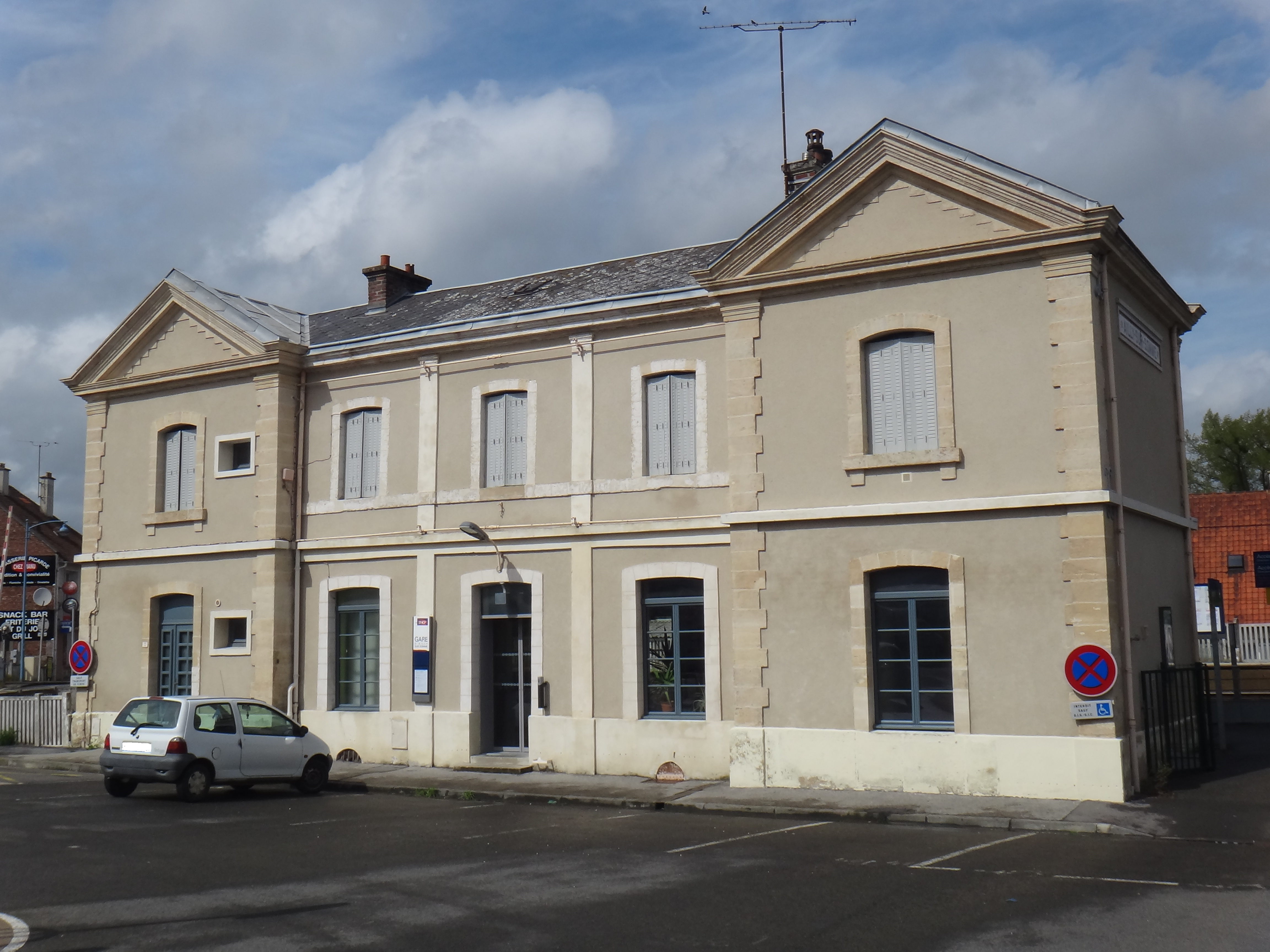 Bâtiment voyageurs de la gare d'Ailly-sur-Somme, Somme, Picardie, France, en mai 2014.